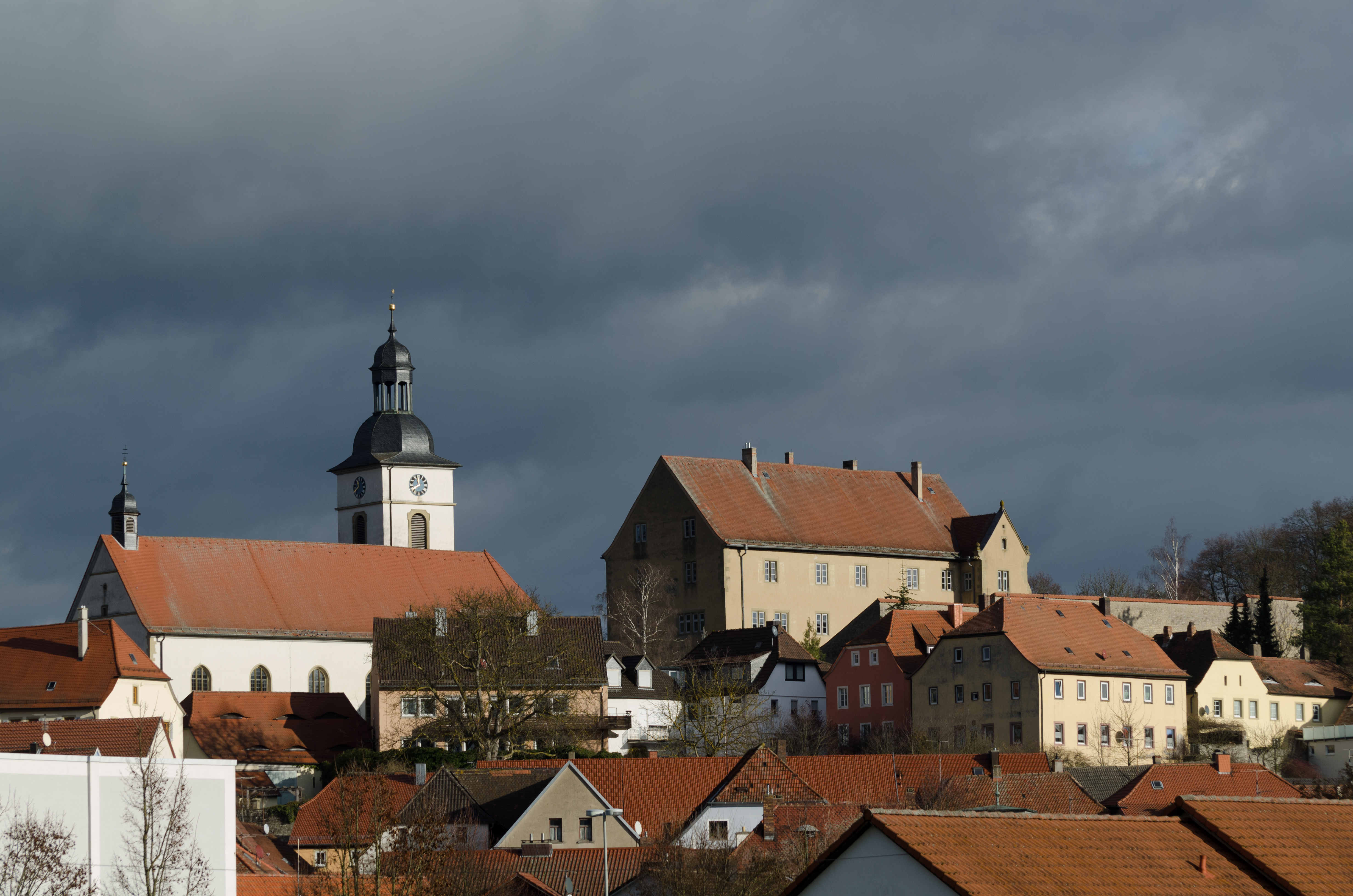 Arntstein, Katholische Pfarrkirche St. Nikolaus, Schloss